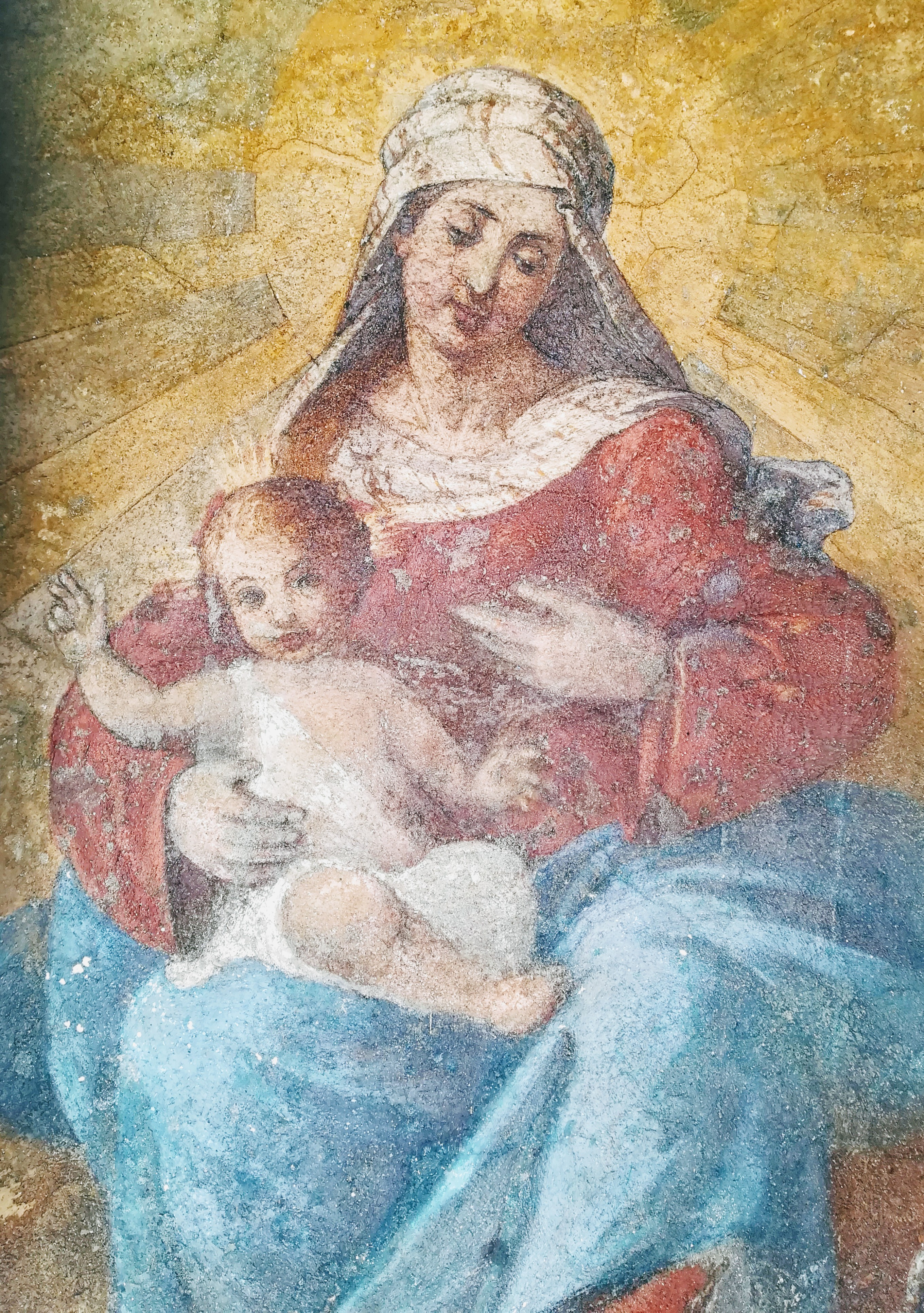 Particolare dell'affresco nella Tribulina dei morti del Dosso in Sola.